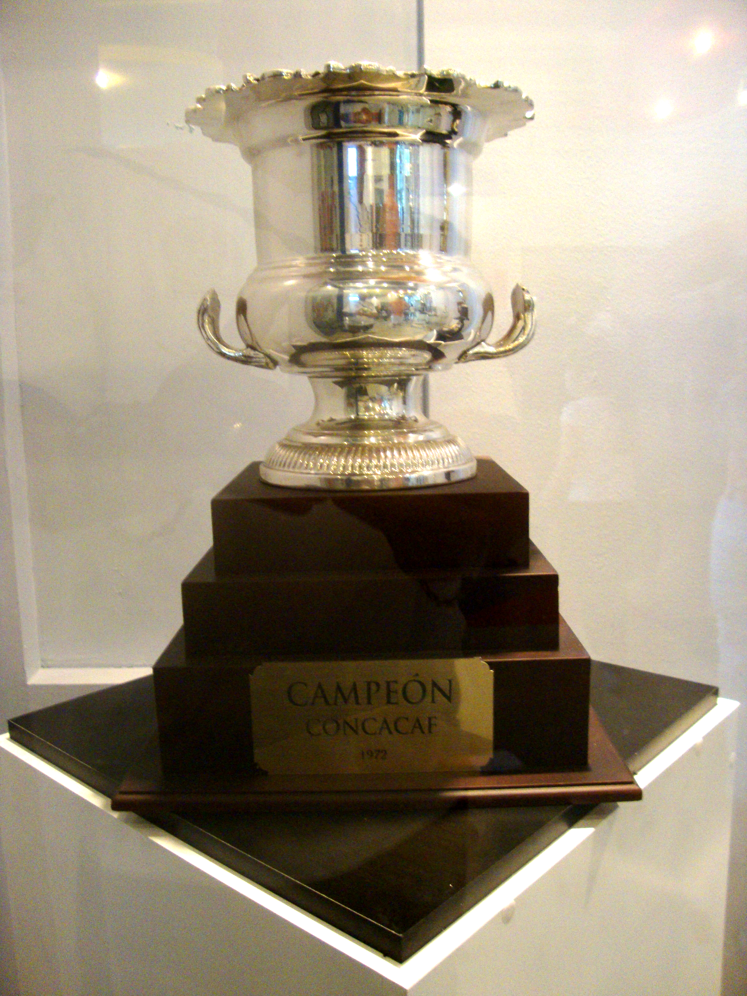 Copa Campeón Concacaf 1972 del CD Olimpia de Honduras